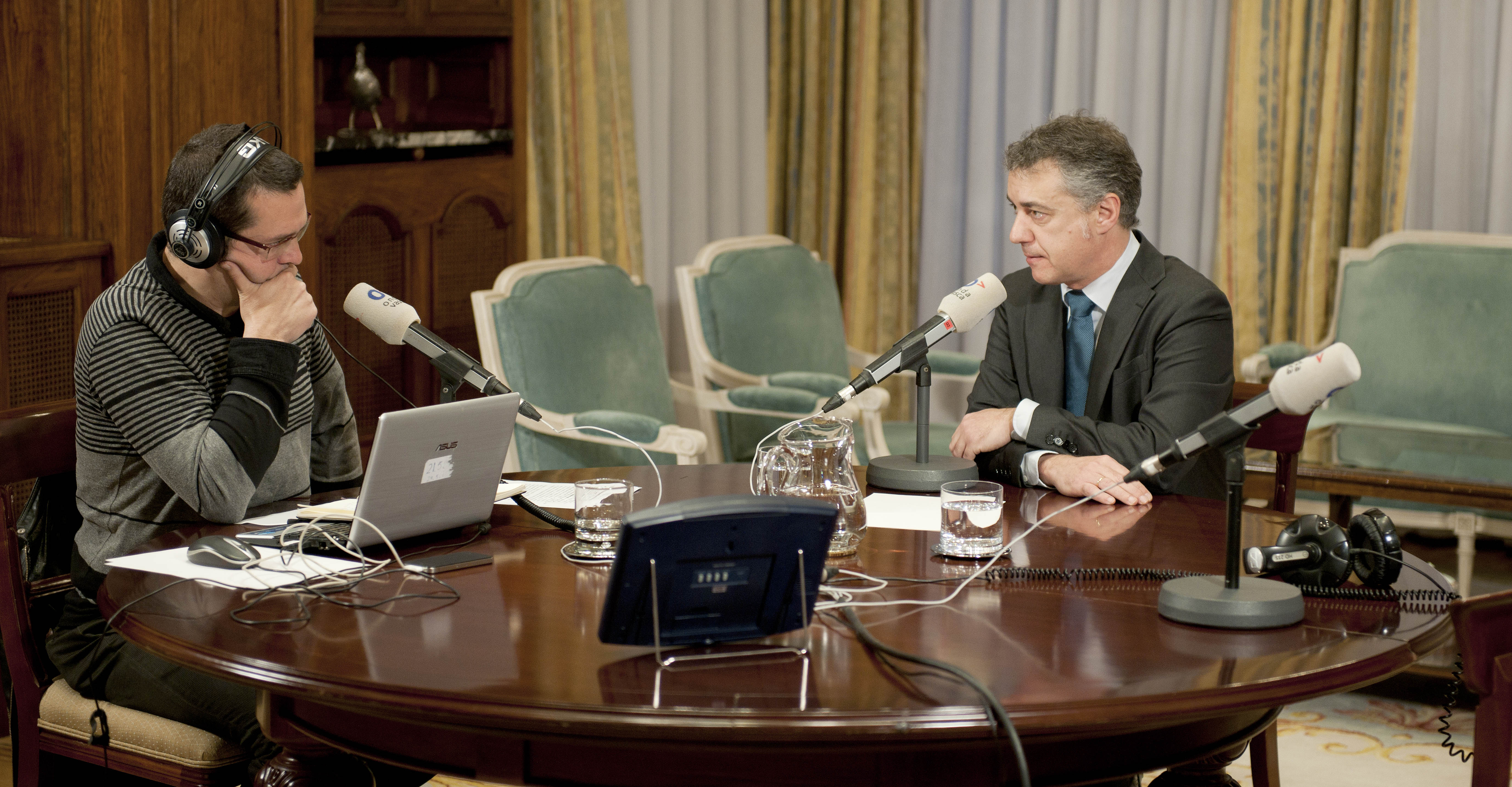 Xabier Lapitz entrevista a Iñigo Urkullu en el programa Euskadi Hoy de Onda Vasca. La entrevista tuvo lugar en el palacio de Ajuria Enea